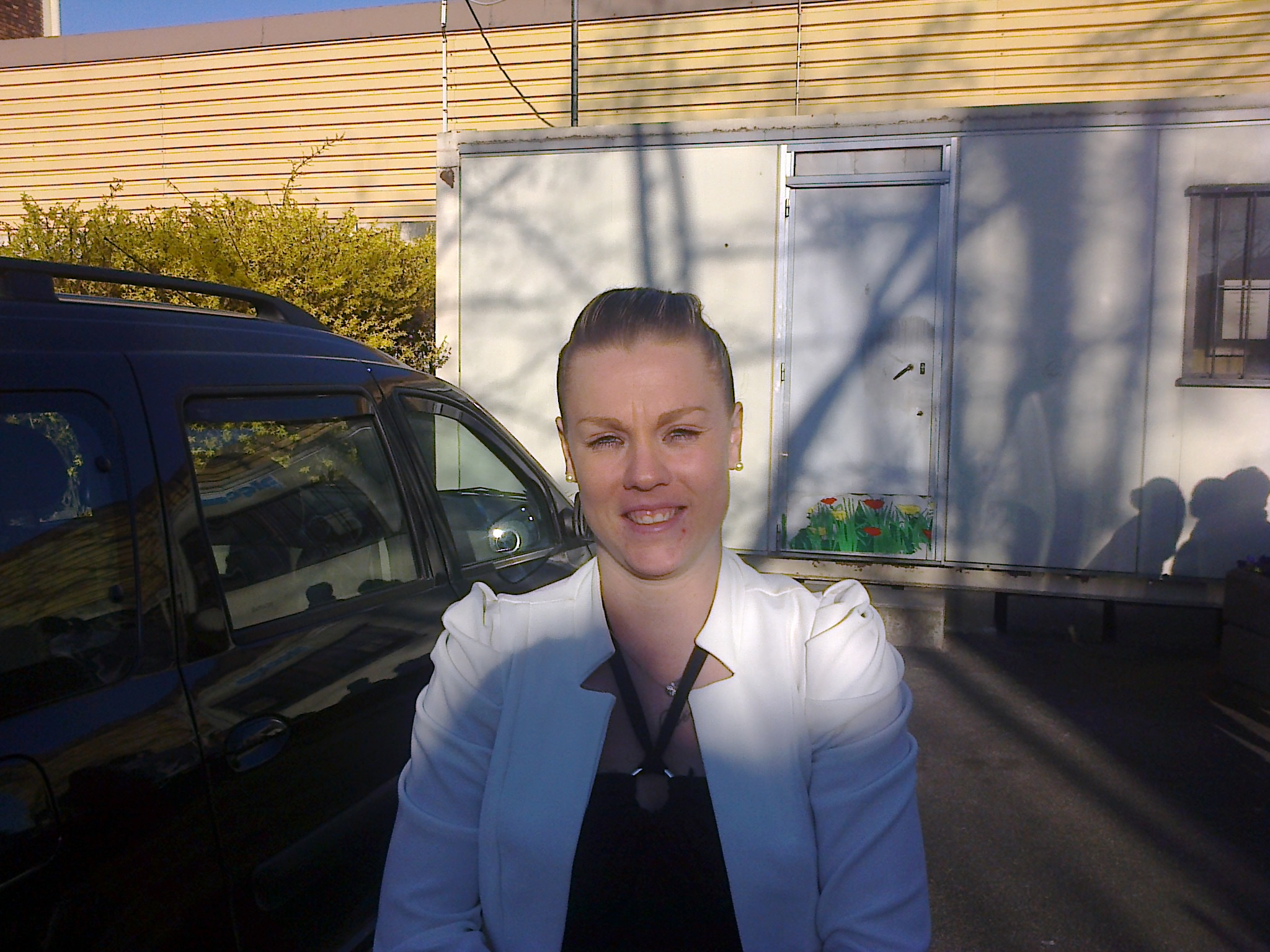 Gwenaëlle Butel après le match VGA Saint-Maur - Juvisy FCF du 16 mars 2014